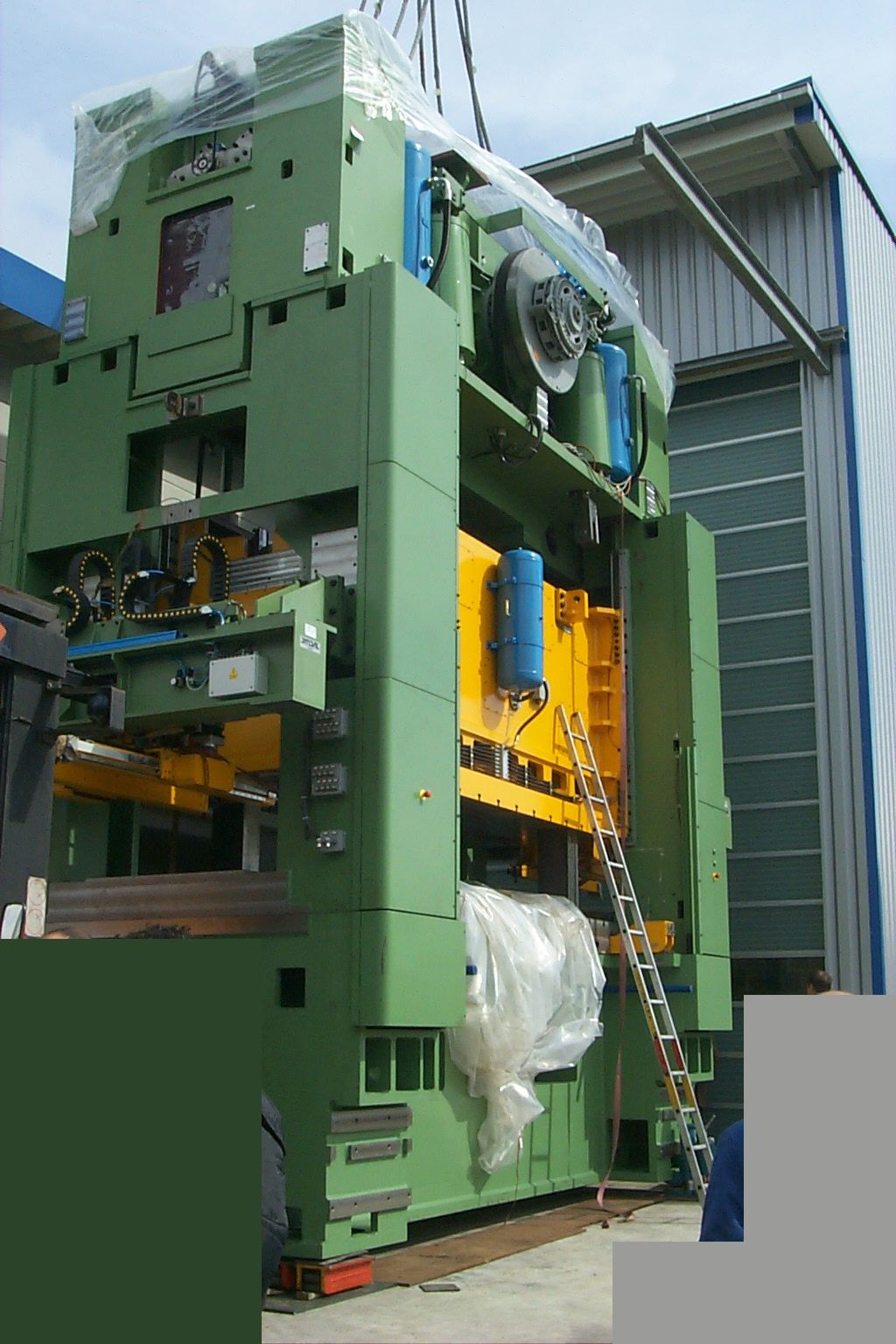 Eine 1.000 Tonnen slow motion Hydraulikpresse mit pressengebundenem Transfer. Diese Maschine wiegt, wie dargestellt, ca. 264 Tonnen. Die Stahlplatten am Boden, über die diese Maschine mit Panzertransportrollen bewegt wurden, waren anschließend kaltverfestigt und nicht mehr eben.